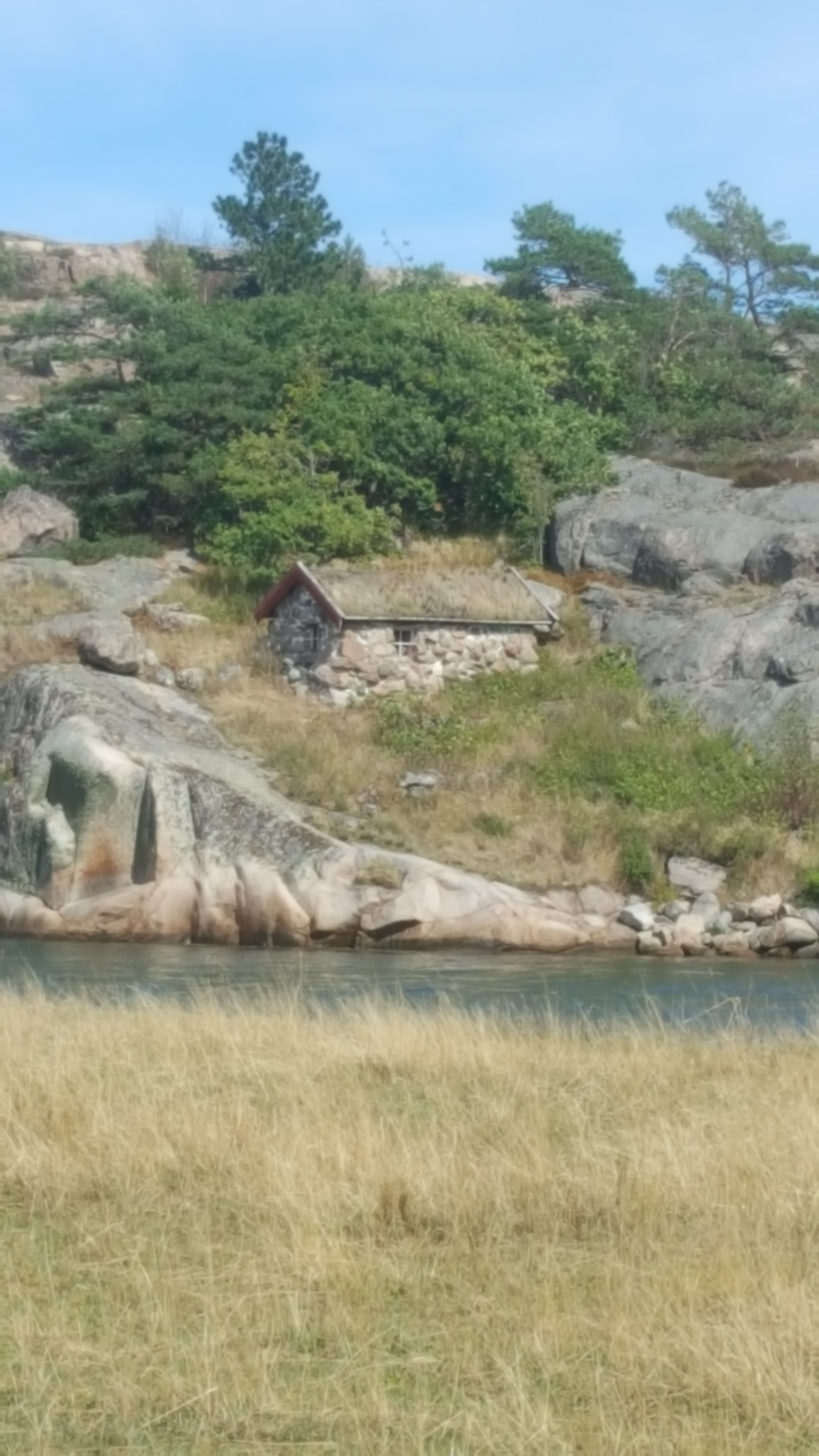 Mor Lenas stuga är en mycket liten stuga på ett par kvadratmeter, gjord av fältsten och med grästak, byggd på fastlandet invid Sotekanalen i Bohuslän.